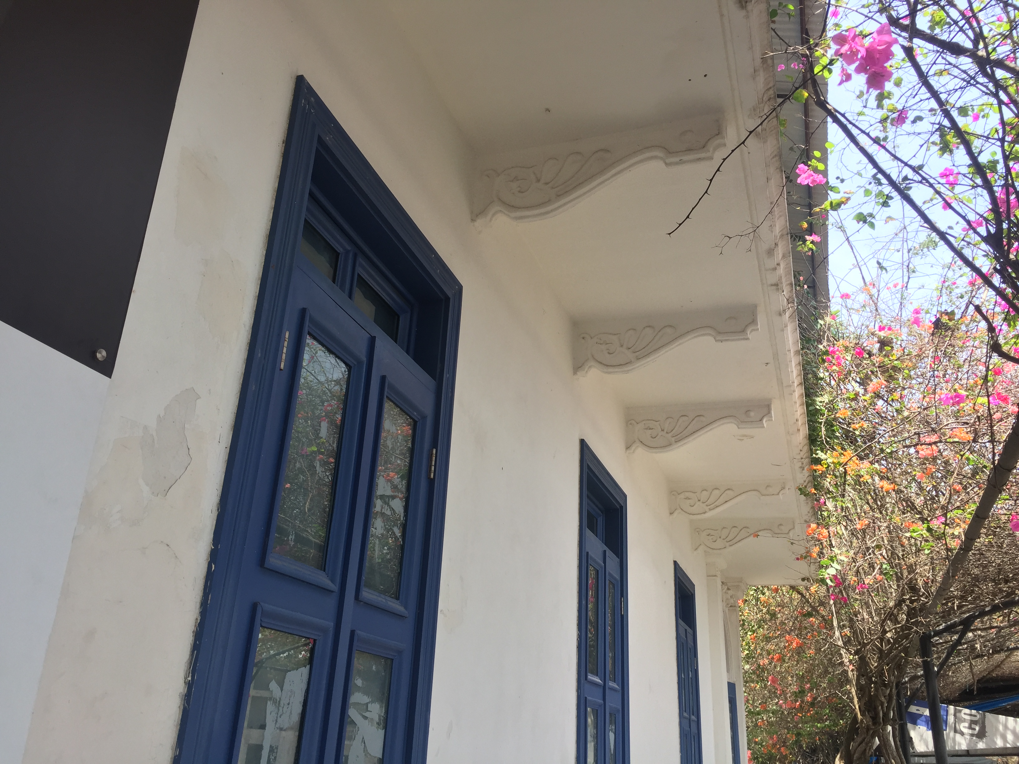 Arquitectura del edificio Centro Cultural de España Casa del Soldado. 30 de marzo 2019. Casco Antiguo desde el Paseo de las Bóvedas.